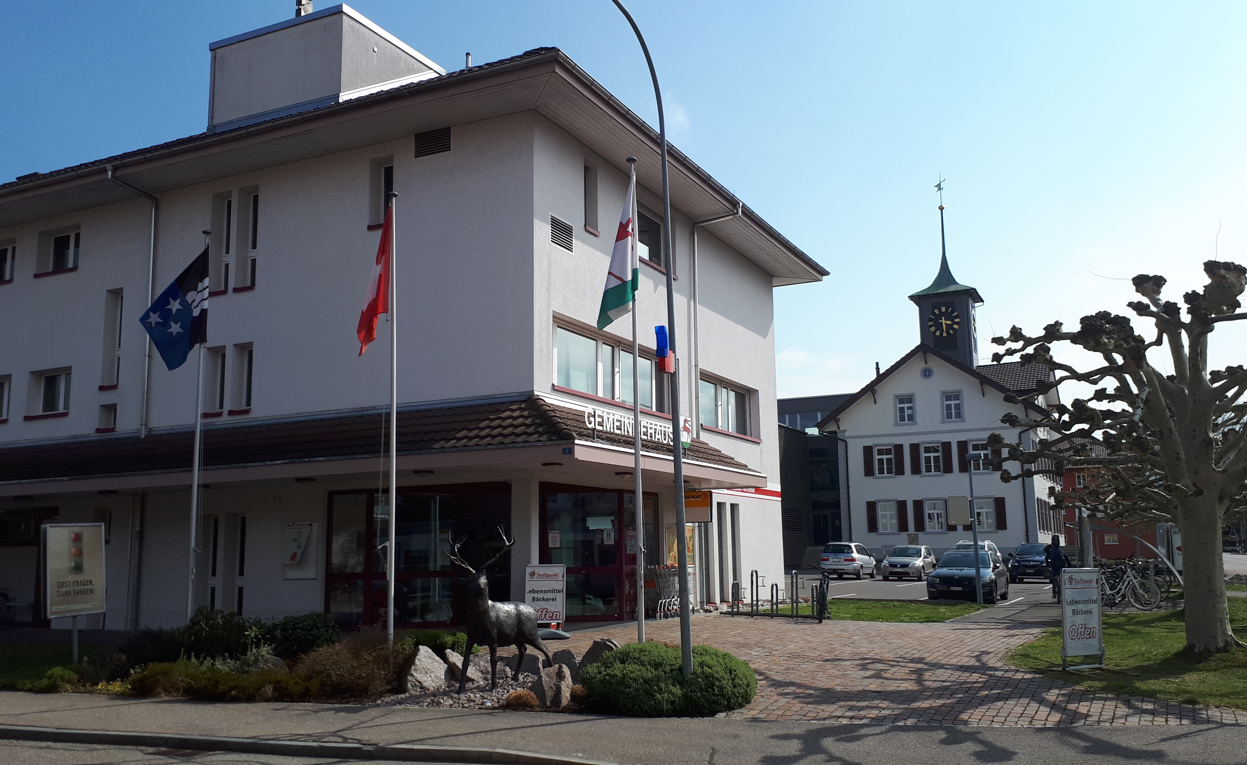 Hirschthal Dorfzentrum